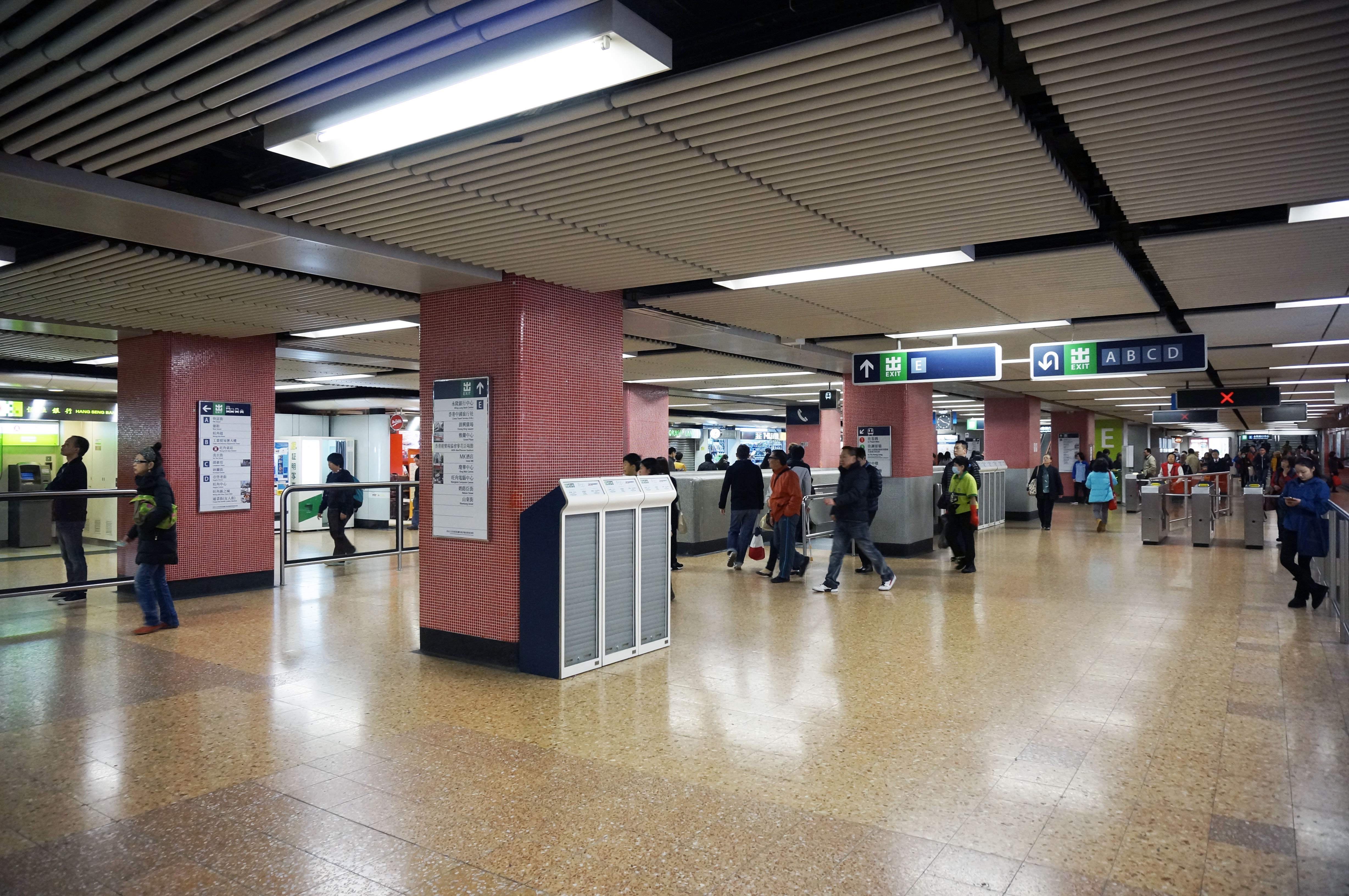 港鐵旺角站大堂